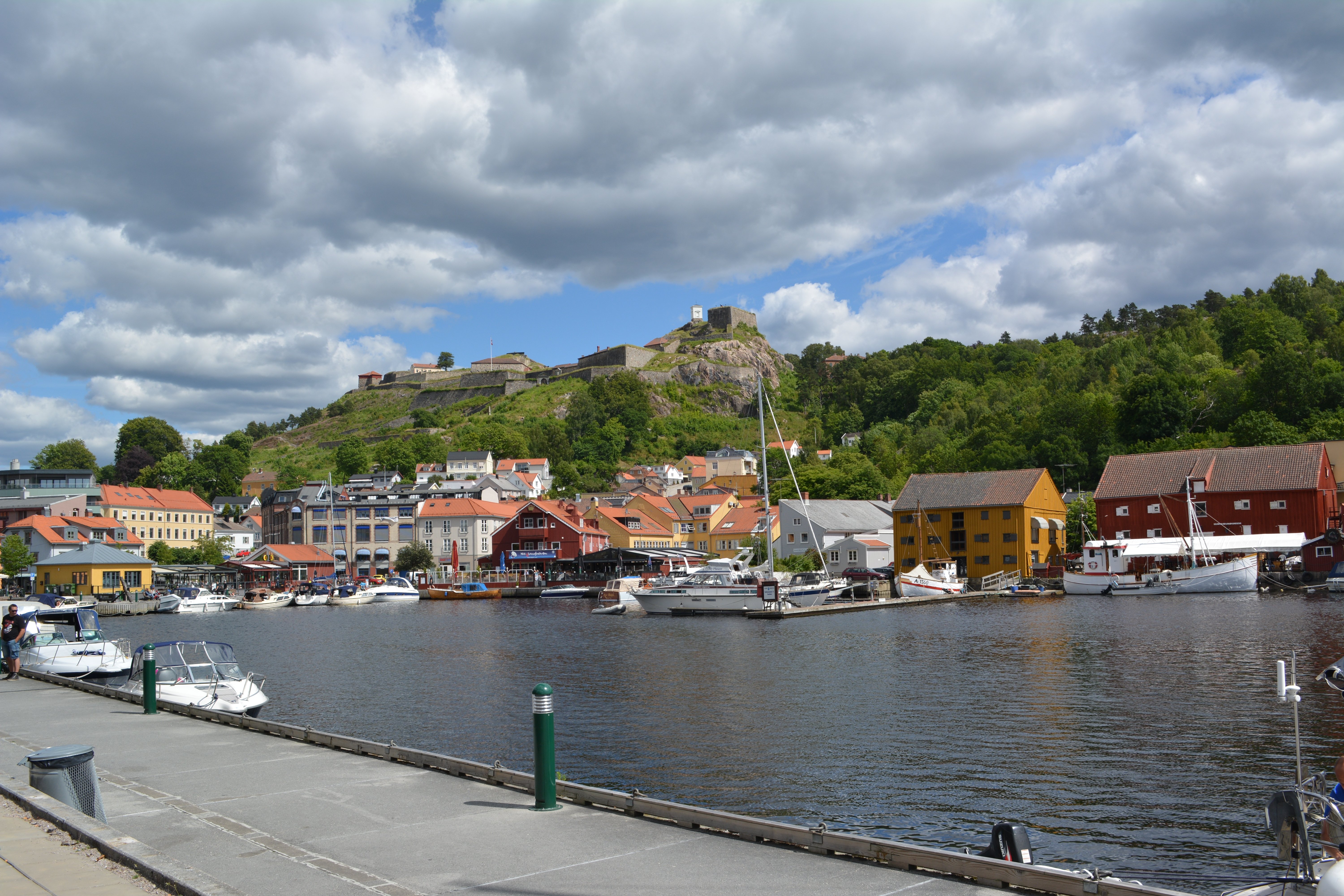 Blick vom alten Stadthafen auf die Festung (Fredriksten festning)